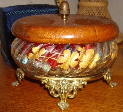 Bonbonnière de cristal et piétement bronze XIXe siècle